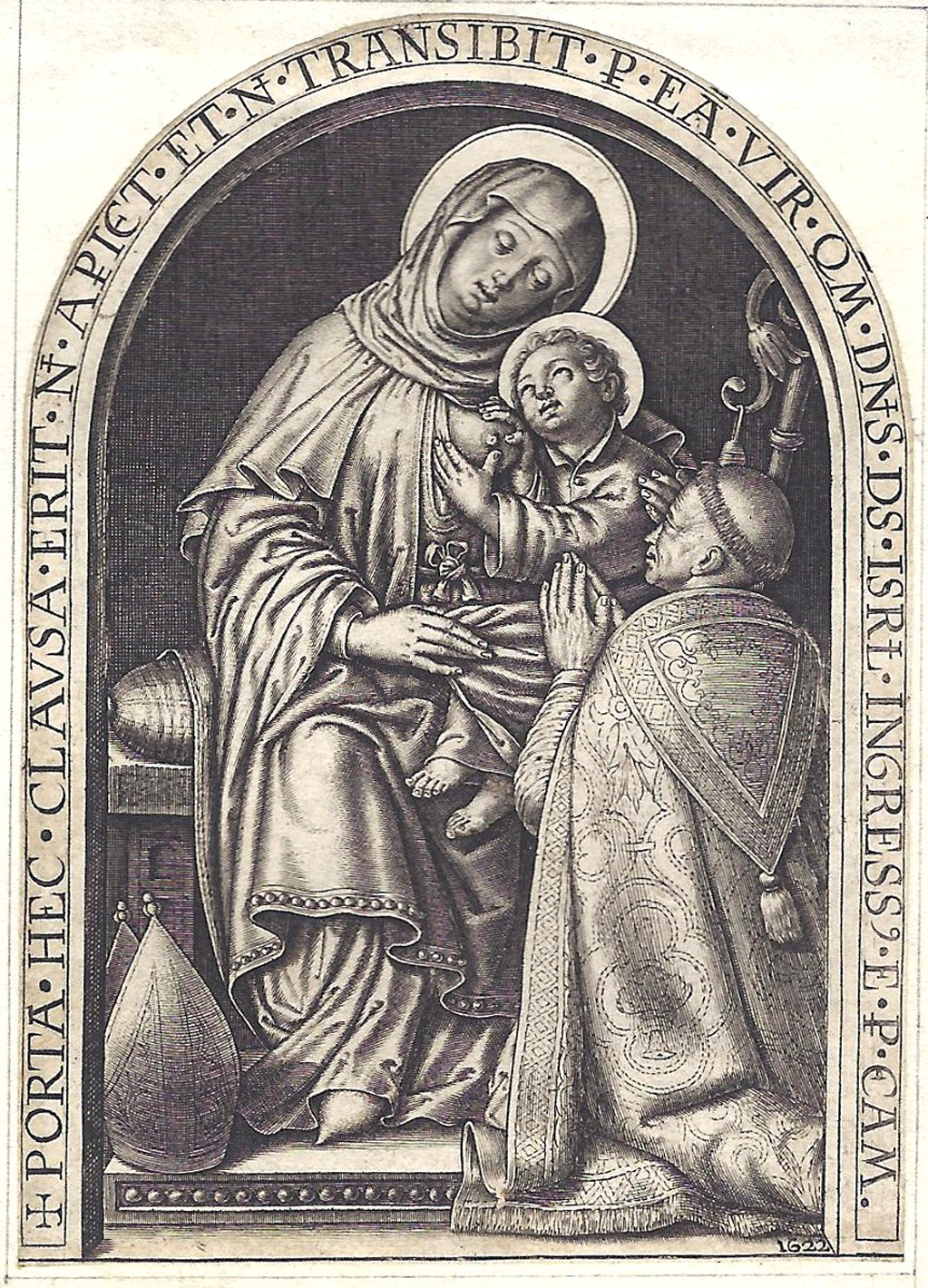 La Vierge dite de Dom Rupert avec l'abbé Oger de Loncin. Gravure de Jean Valdor l'Ainé - 98 mm x 69 mm